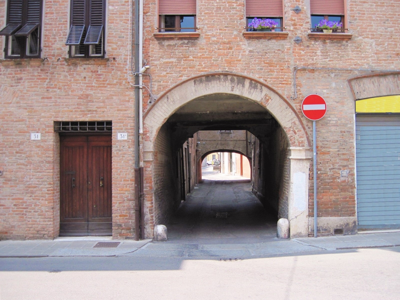 Via Ripagrande - Vicolo del Chiozzino (proseguimento di Via Del Turco)